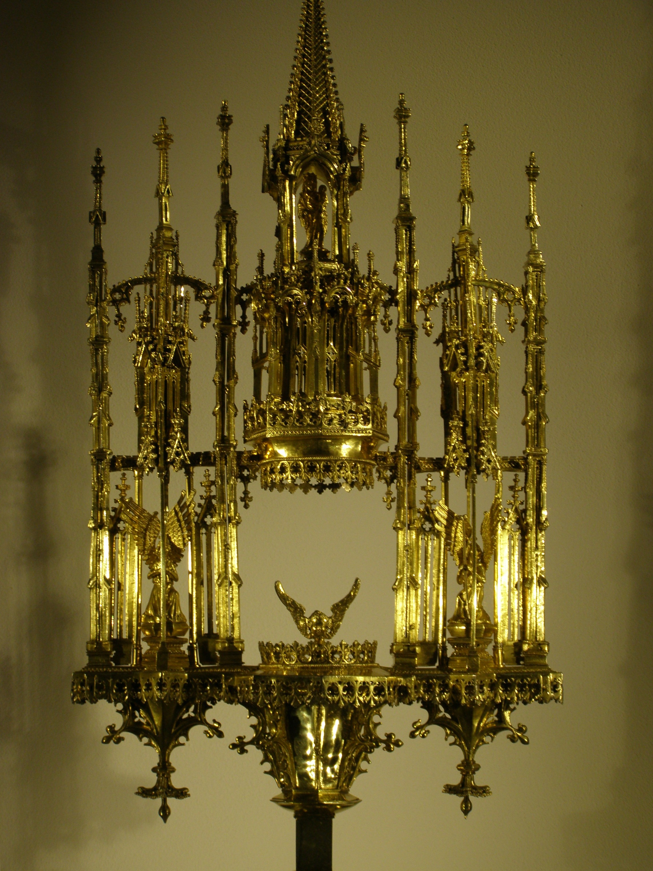 Česky: Kutná Hora, část Sedlec, klášterní kostel Nanebevzetí Panny Marie a svatého Jana Křtitele, sedlecká monstrance